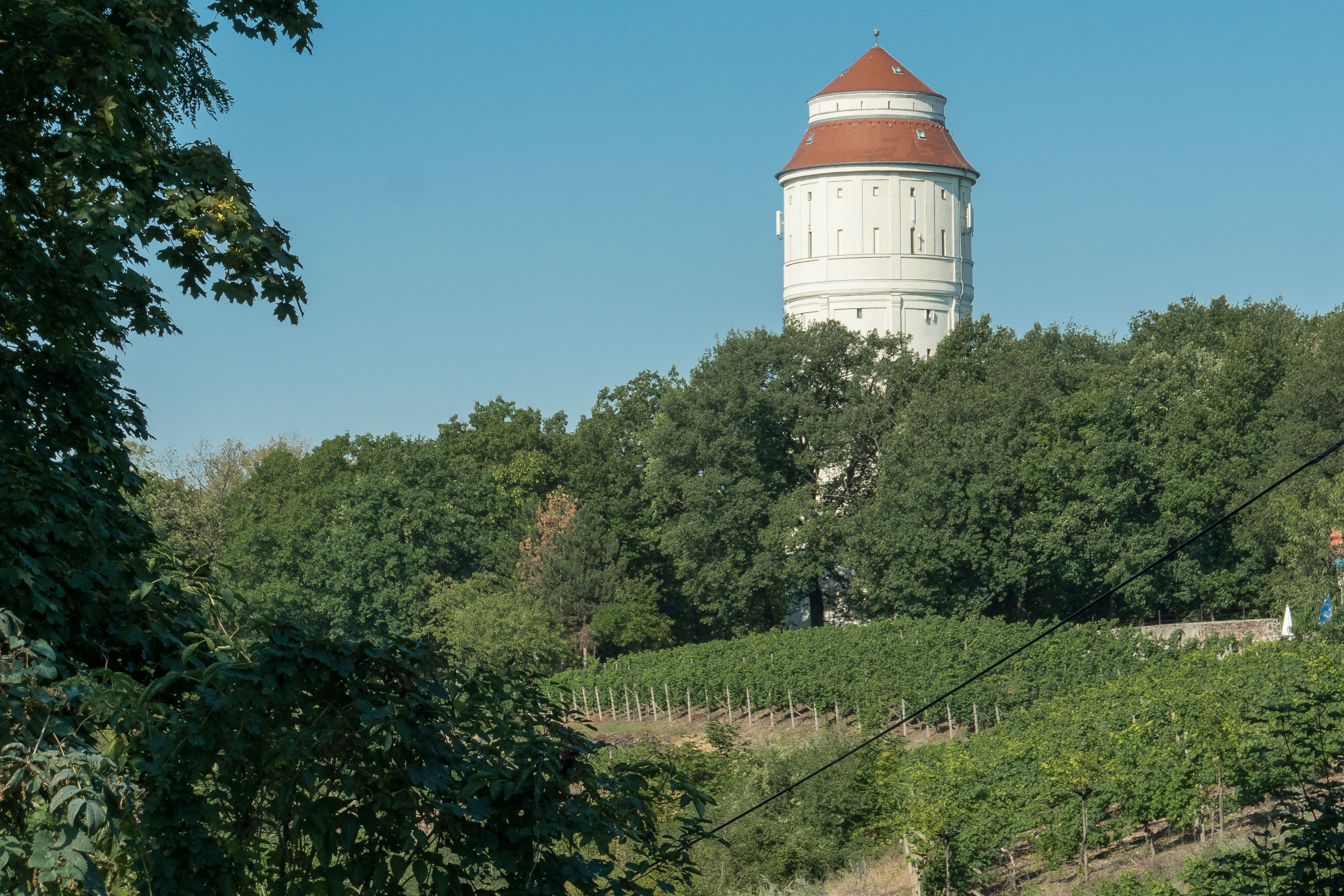 Wasserturm auf der König-Friedrich-August-Höhe in Radebeul